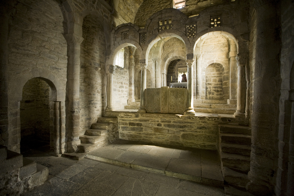 unidentified Spain